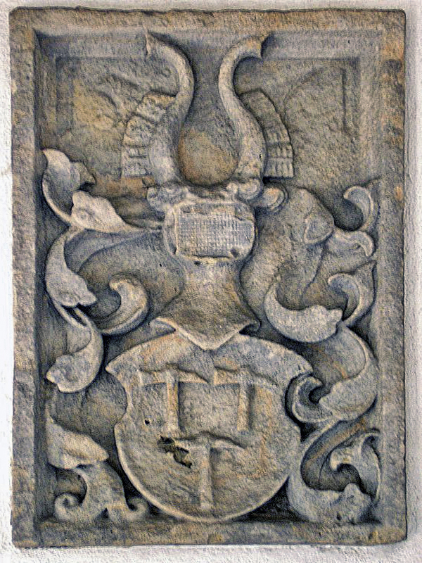 Altenstein (Landkreis Haßberge, Unterfranken). Wappen der Freiherren Stein von Altenstein in der Vorhalle der Pfarrkirche. Eigene Aufnahme, Aug. 2006 / Parish church Altenstein near Ebern (Lower Franconia, Germany). Coat of arms of the Stein von Altenstein dynasty. Own photo, Aug. 2006